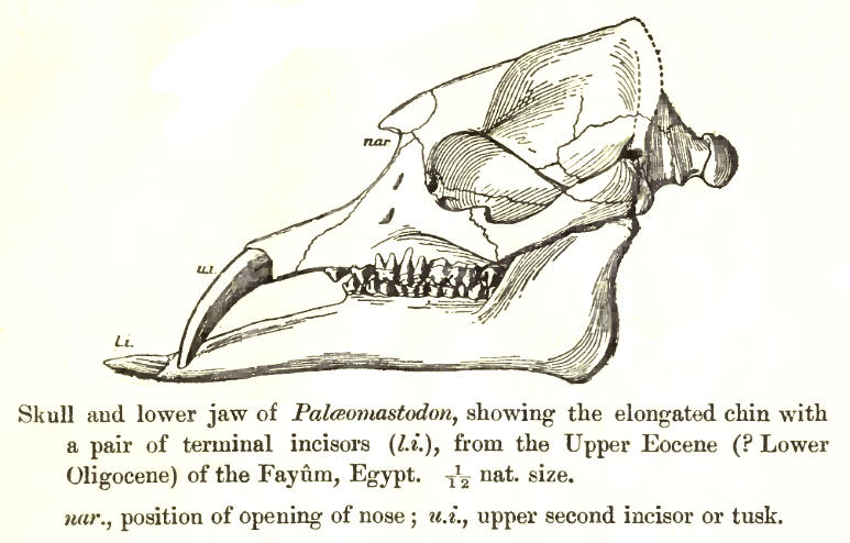 Paleomastodon skull